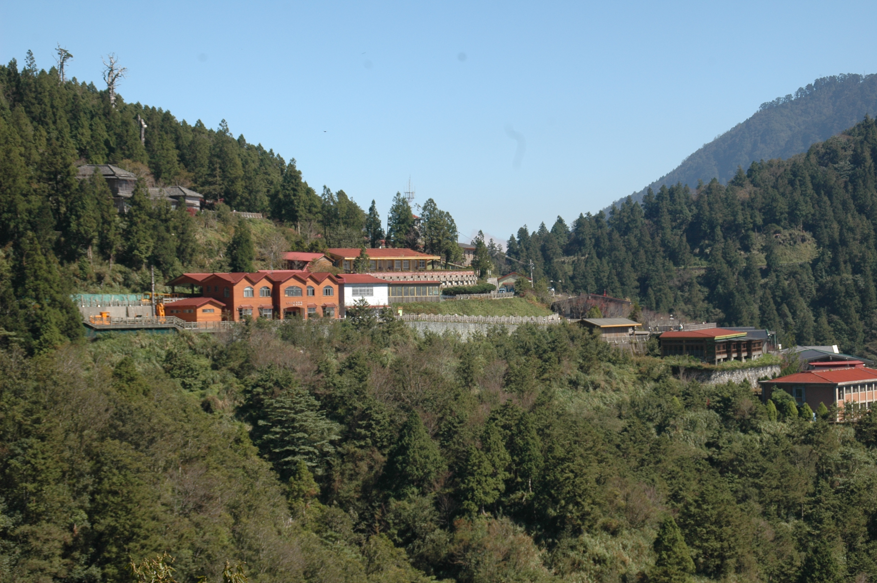 中文（台灣）: 宜蘭棲蘭山檜木林1